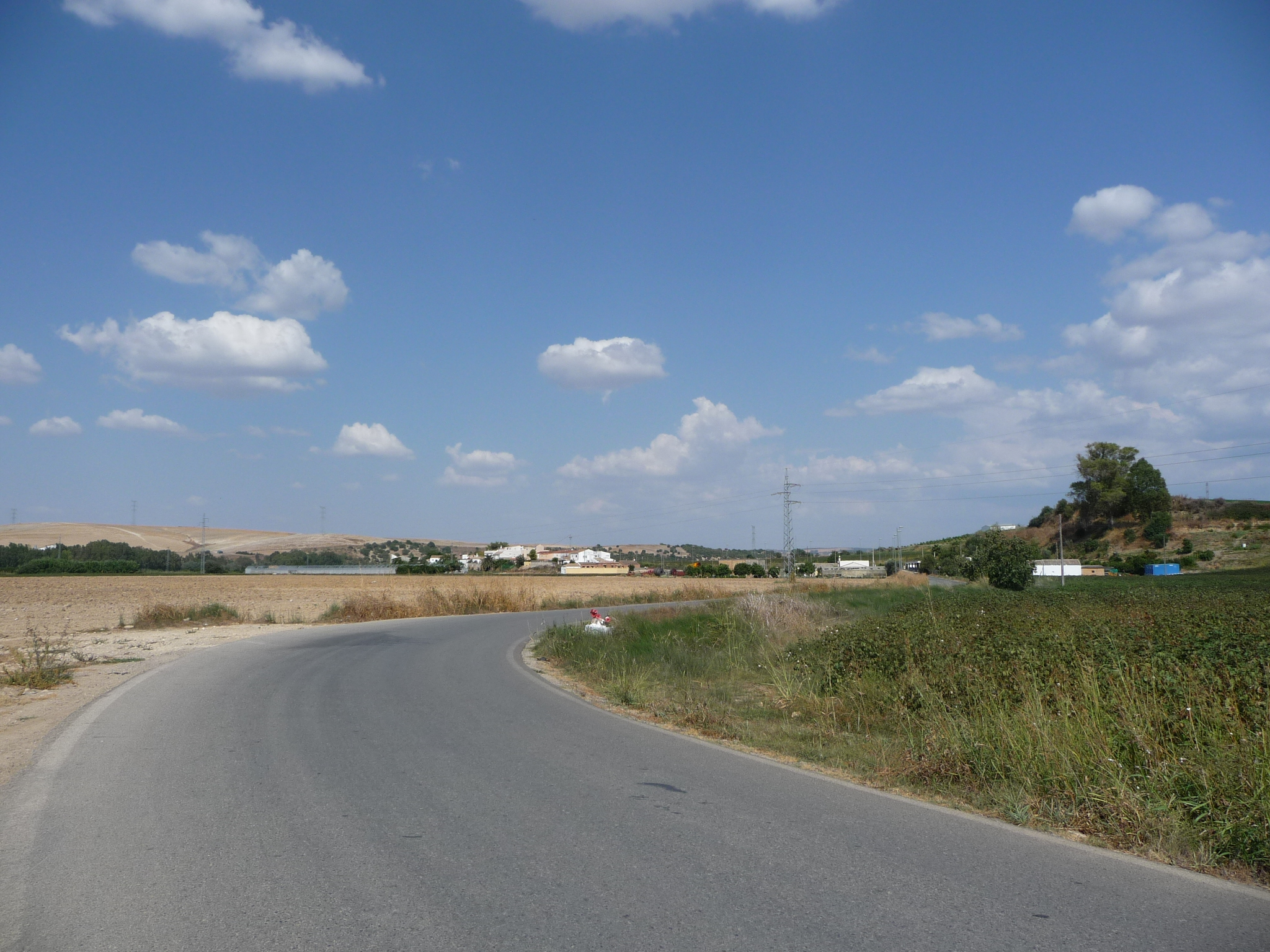 LaPedrosa-Arcos-P1040543.JPG